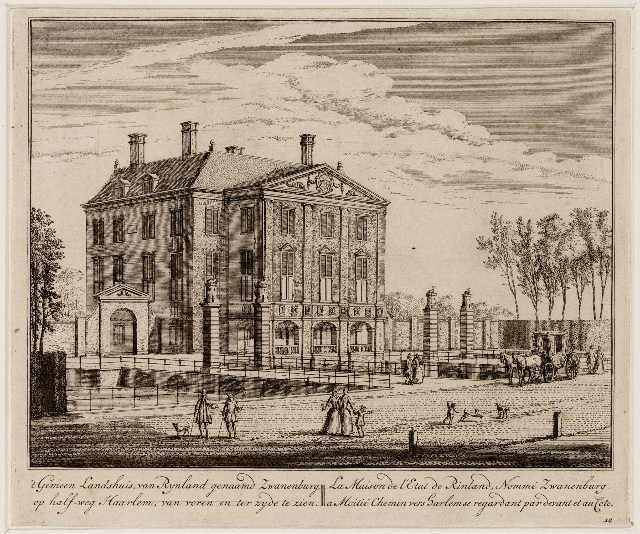 Beschrijving 't Gemeen Landshuis van Rijnland genaamd Zwanenburg op half-weg Haarlem Gemeente Haarlemmerliede en Spaarnwoude: het Gemeenlandshuis van Rijnland genaamd Zwanenburg te Halfweg, van voren en van opzij. Ets. Afmetingen: 144 x 198 mm. Documenttype prent Vervaardiger Rademaker, Abraham (1675-1735) Collectie Collectie Stadsarchief Amsterdam: tekeningen en prenten Datering 1728 Inventarissen Afbeeldingsbestand 010097004825